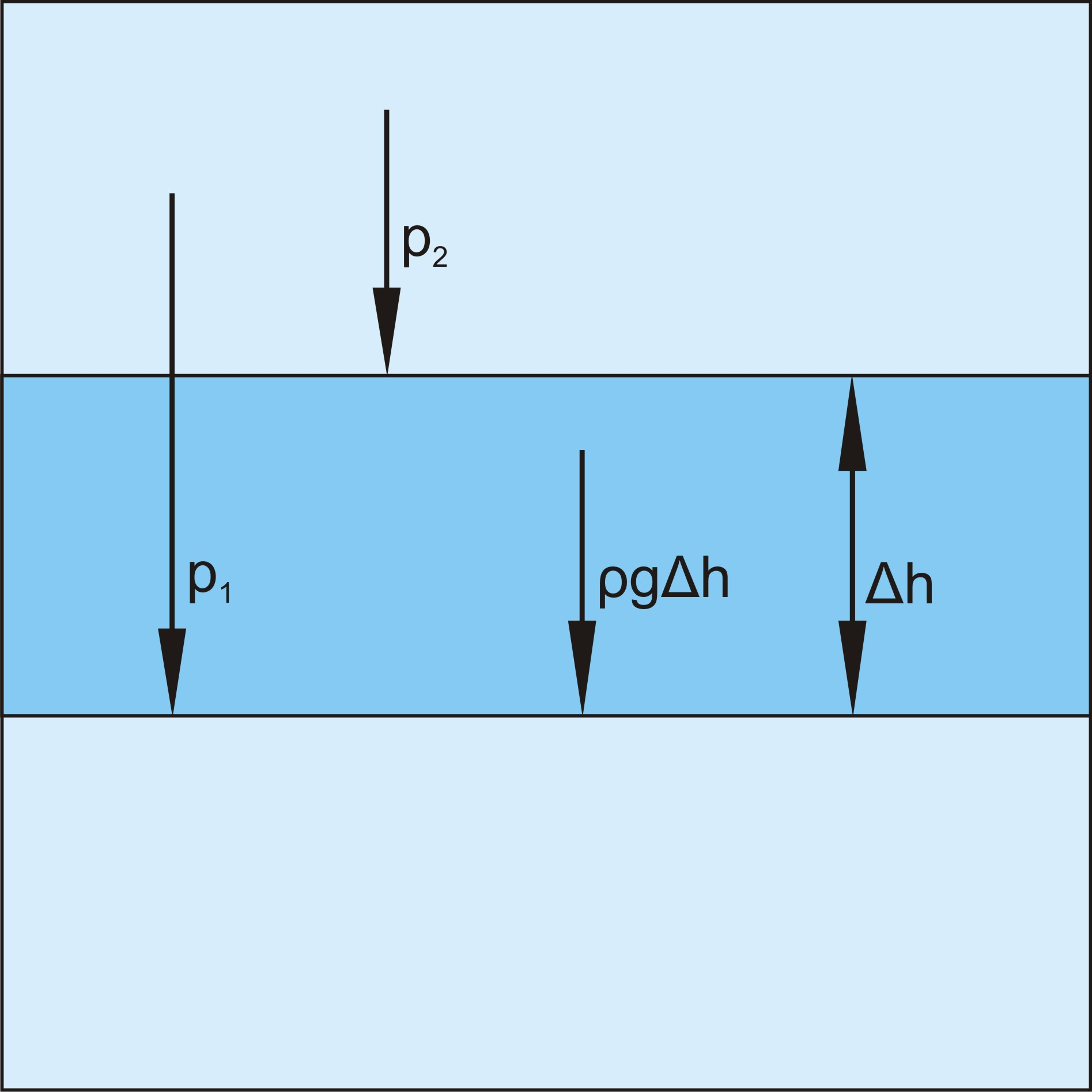 Rysunek ilustrujący zmiany ciśnienia w danej warstwie atmosfery. Stanowiący uzupełnienie do artykułu "Równanie statyki atmosfery"